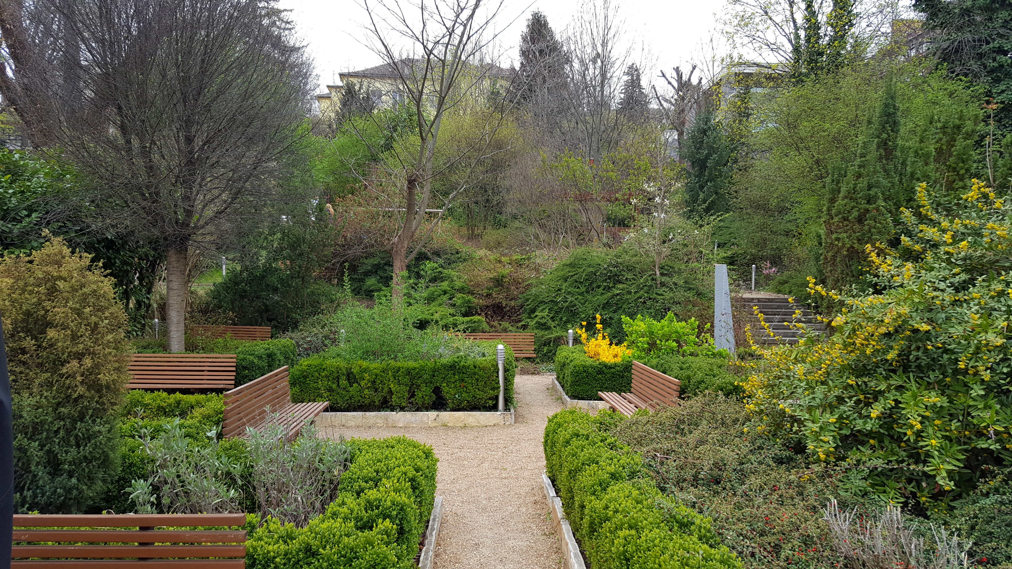 A Barabás-villa kertje 2019 tavaszán